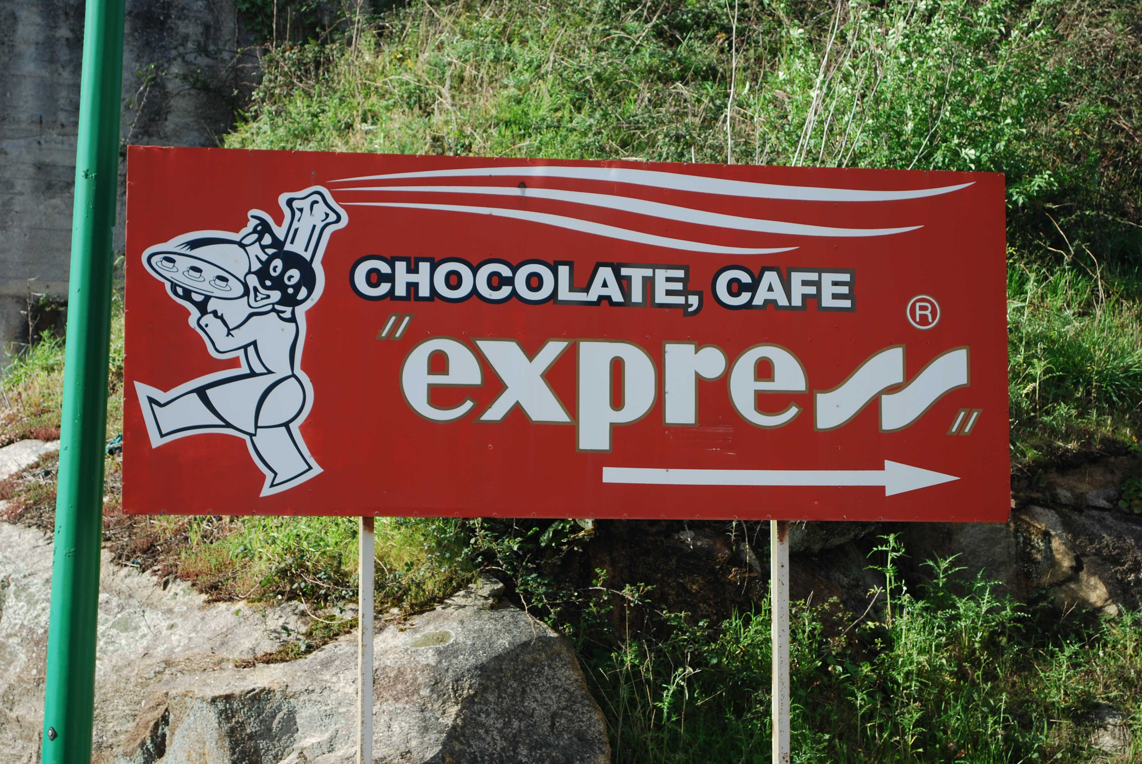 Express en Pocomaco A Coruña Galiza Spain